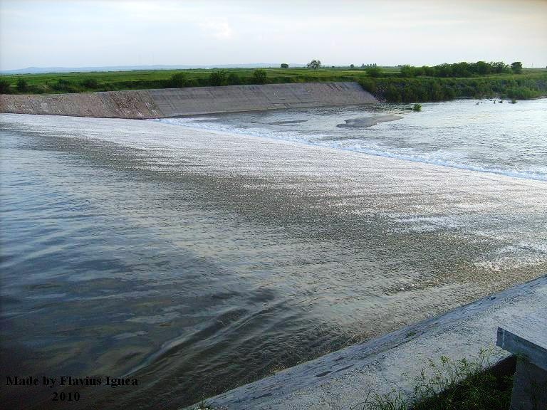 Barajul deversor de pe Râul Timiş din Banat